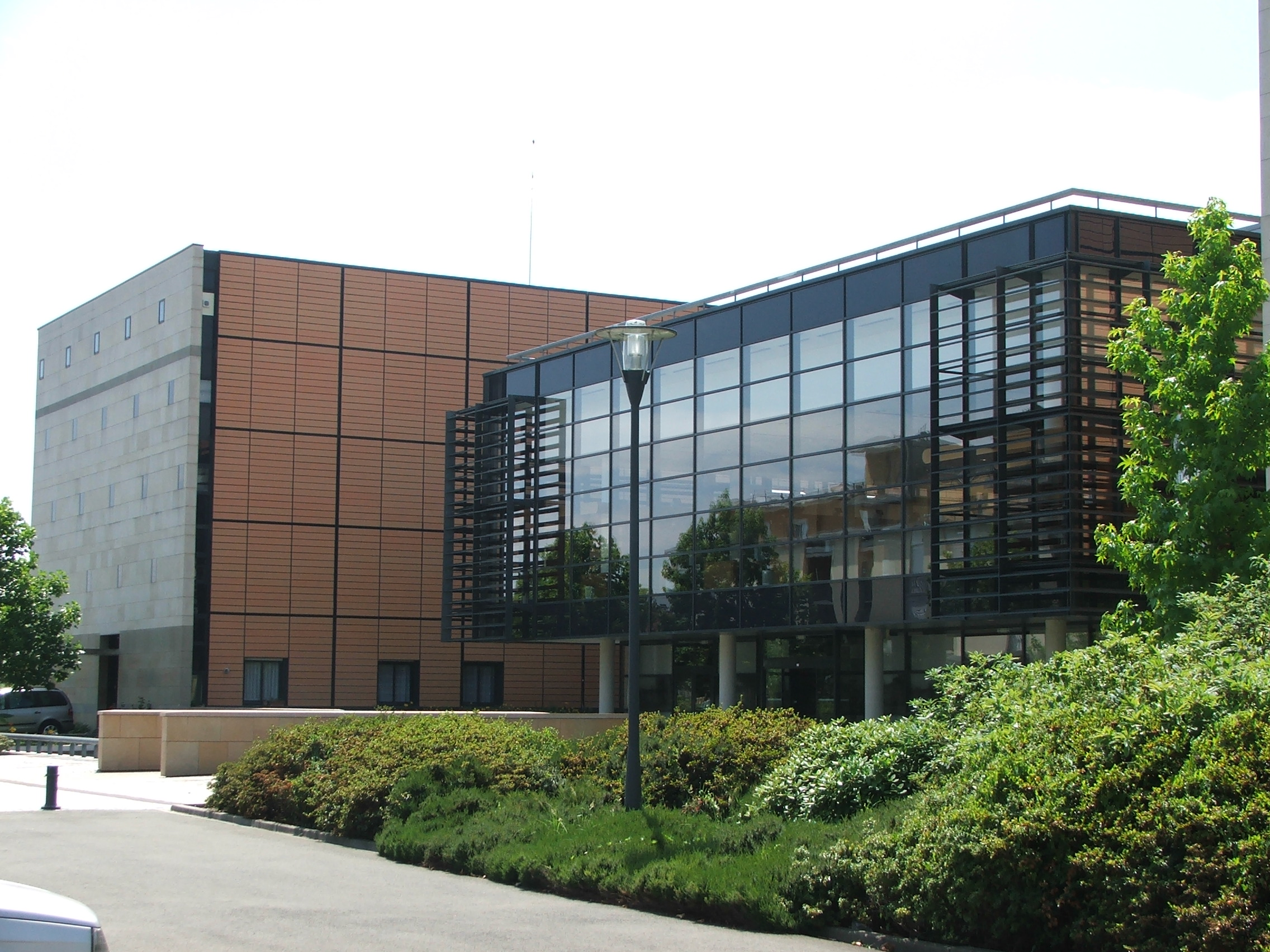 Les Archives Départementales de la Sarthe dans le quartier de Pontlieue au Mans.